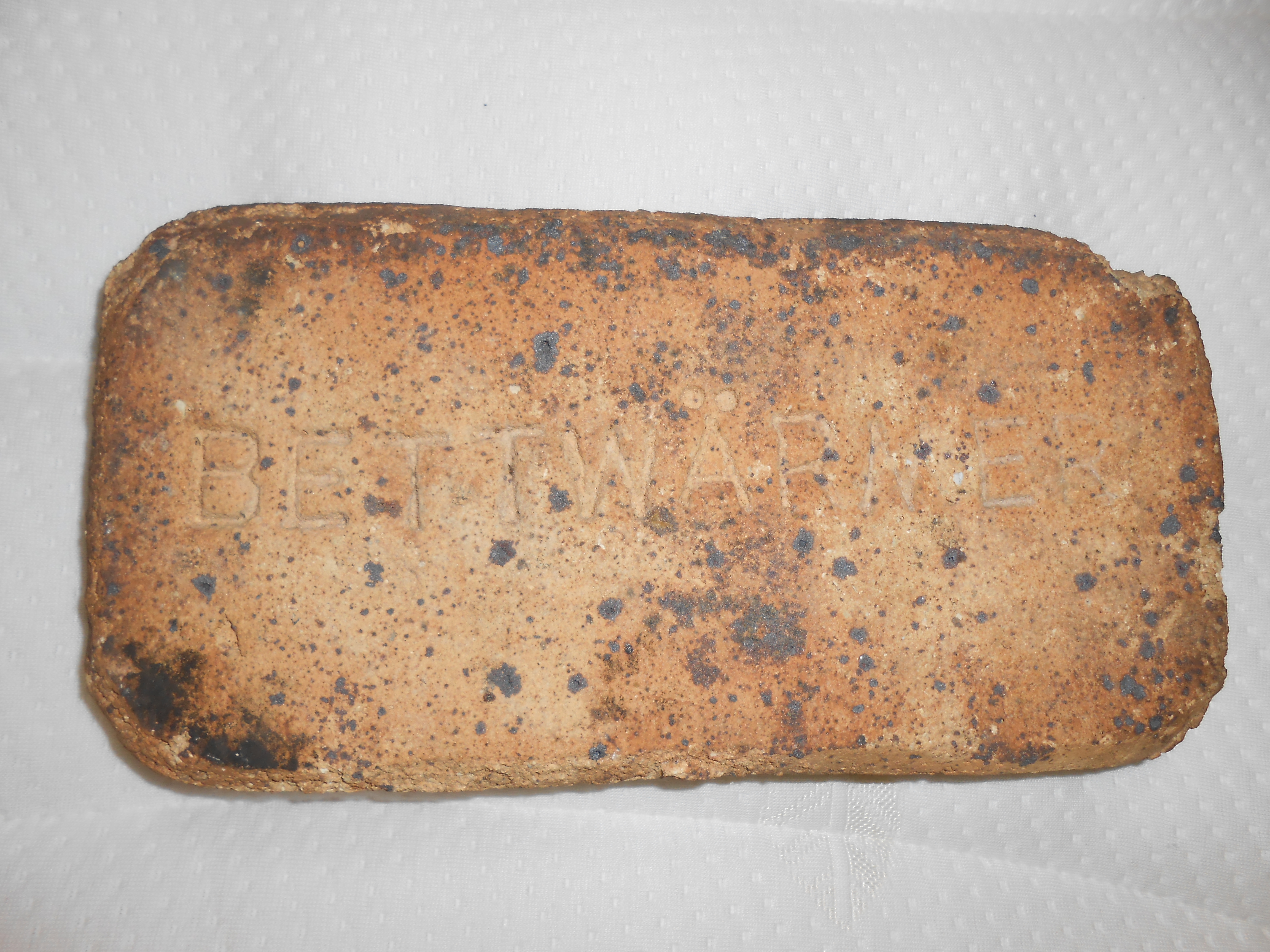 Backstein mit der Aufschrift „Bettwärmer“. Exponat im Betten- und Schlafmuseum Freiberg